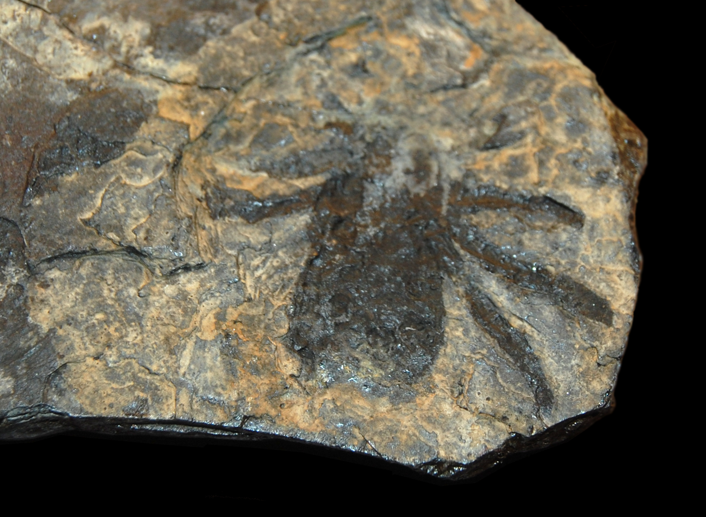 Naturhistorisches Museum Wien